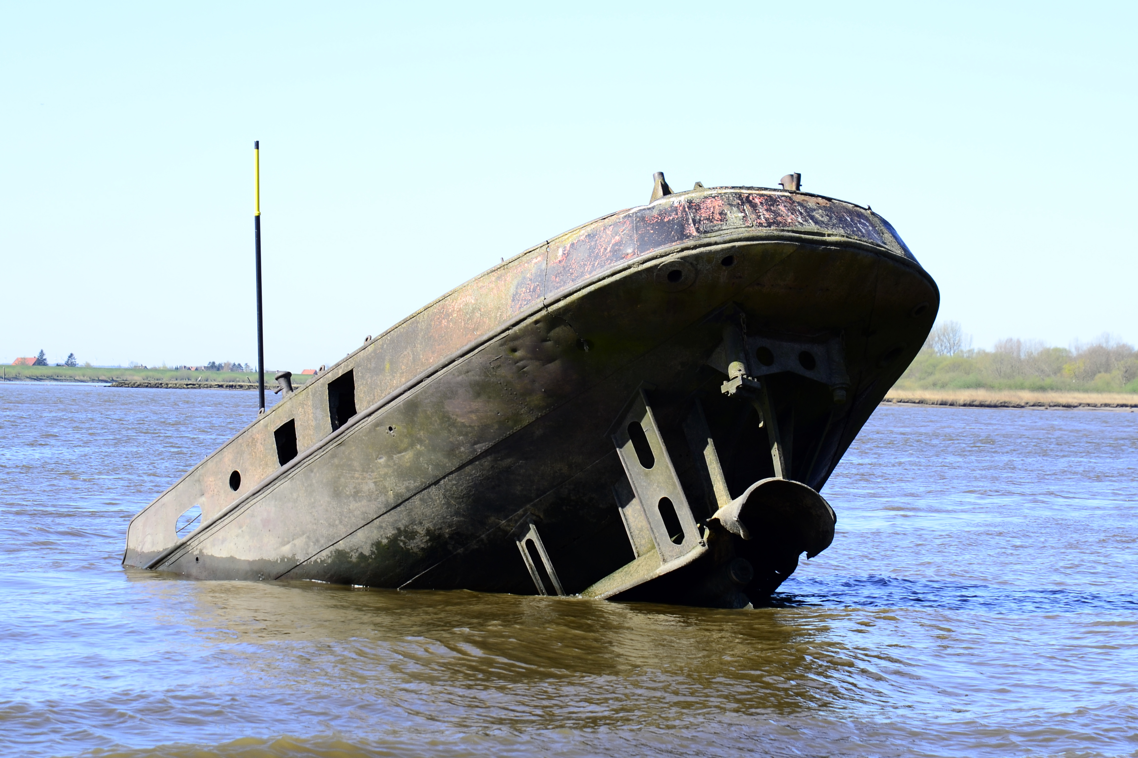 Das Wrack des deutschen Binnenschiffs Uwe, das 1975 in der Elbe sank